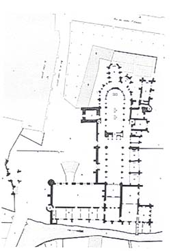 Plan de l'ancien Palais des comtes de Champagne et de la collégiale Saint-Etienne